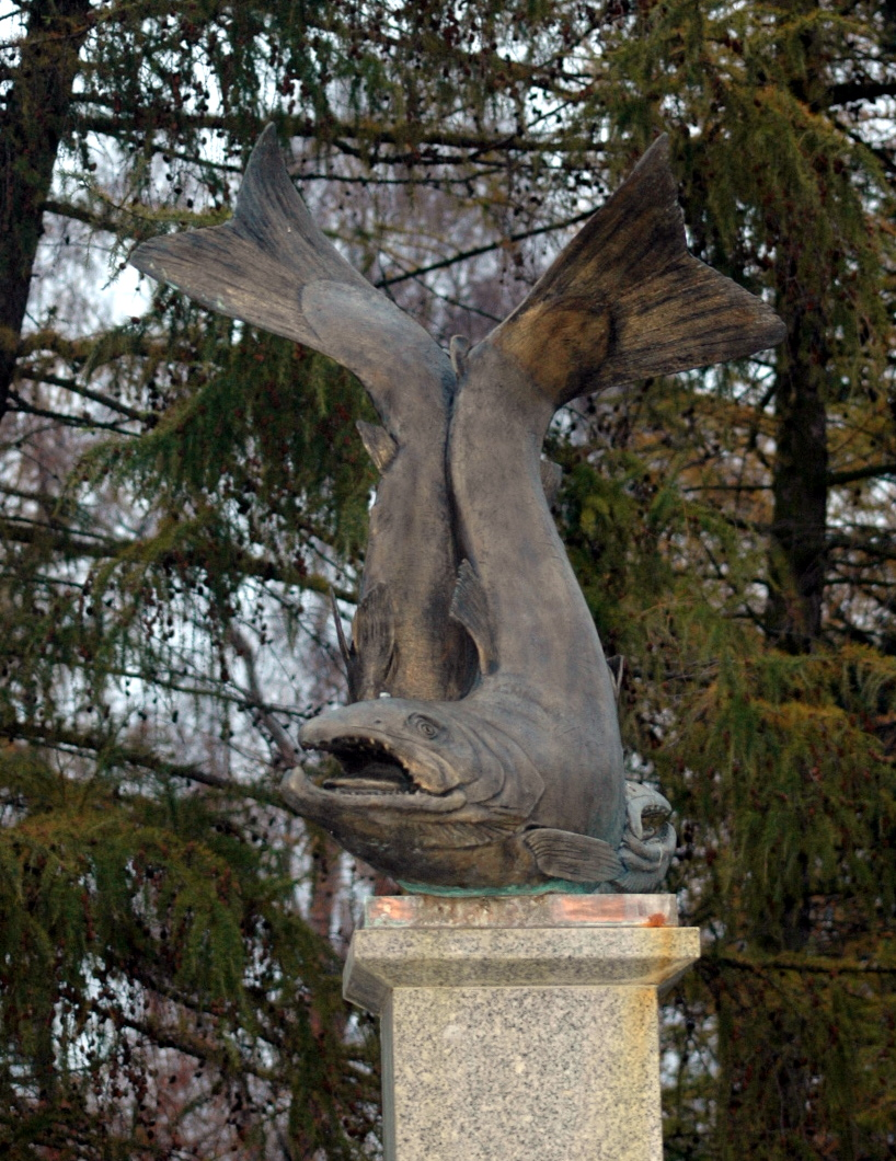 Pomnik łosia w Dygowie.